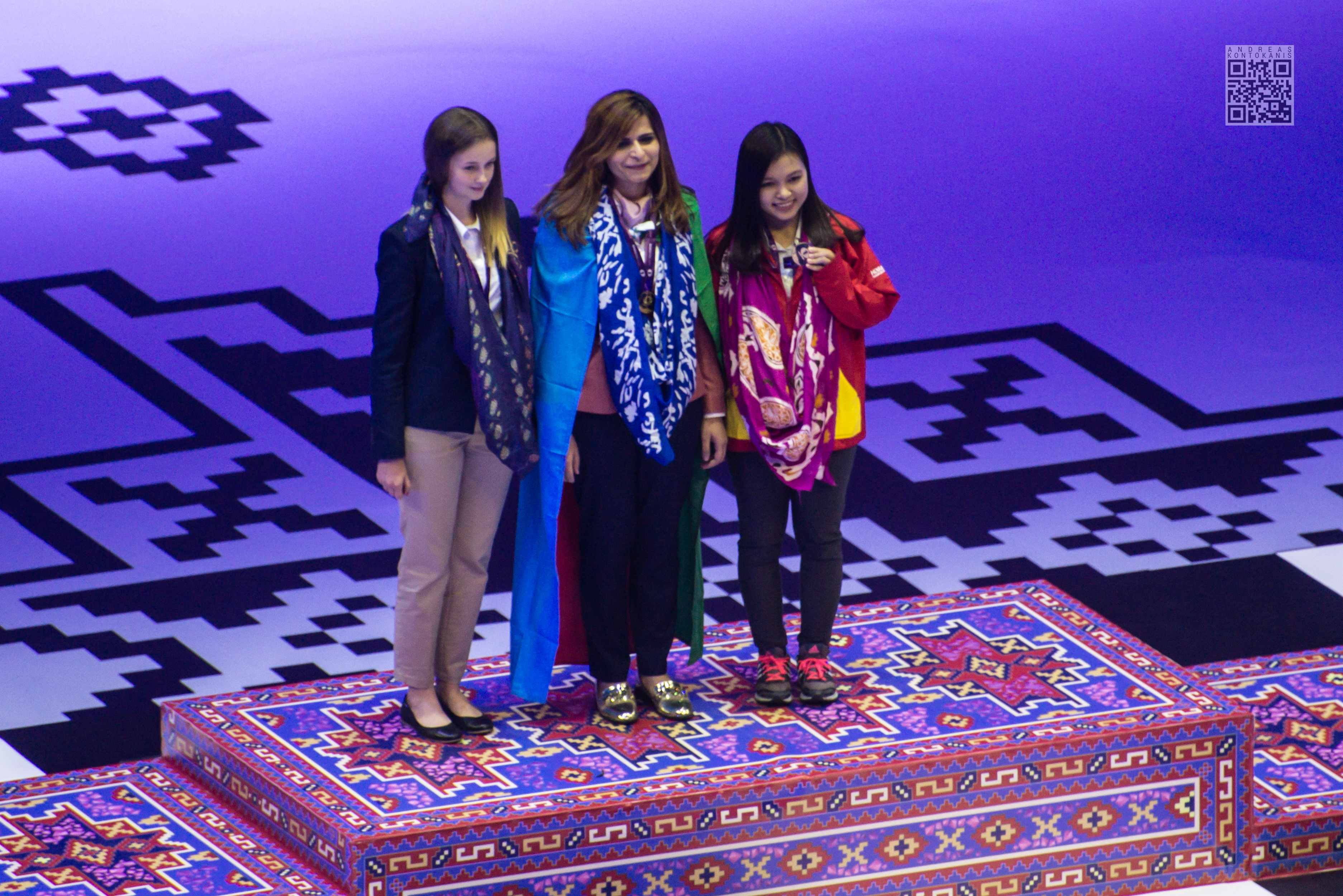 3rd board winners